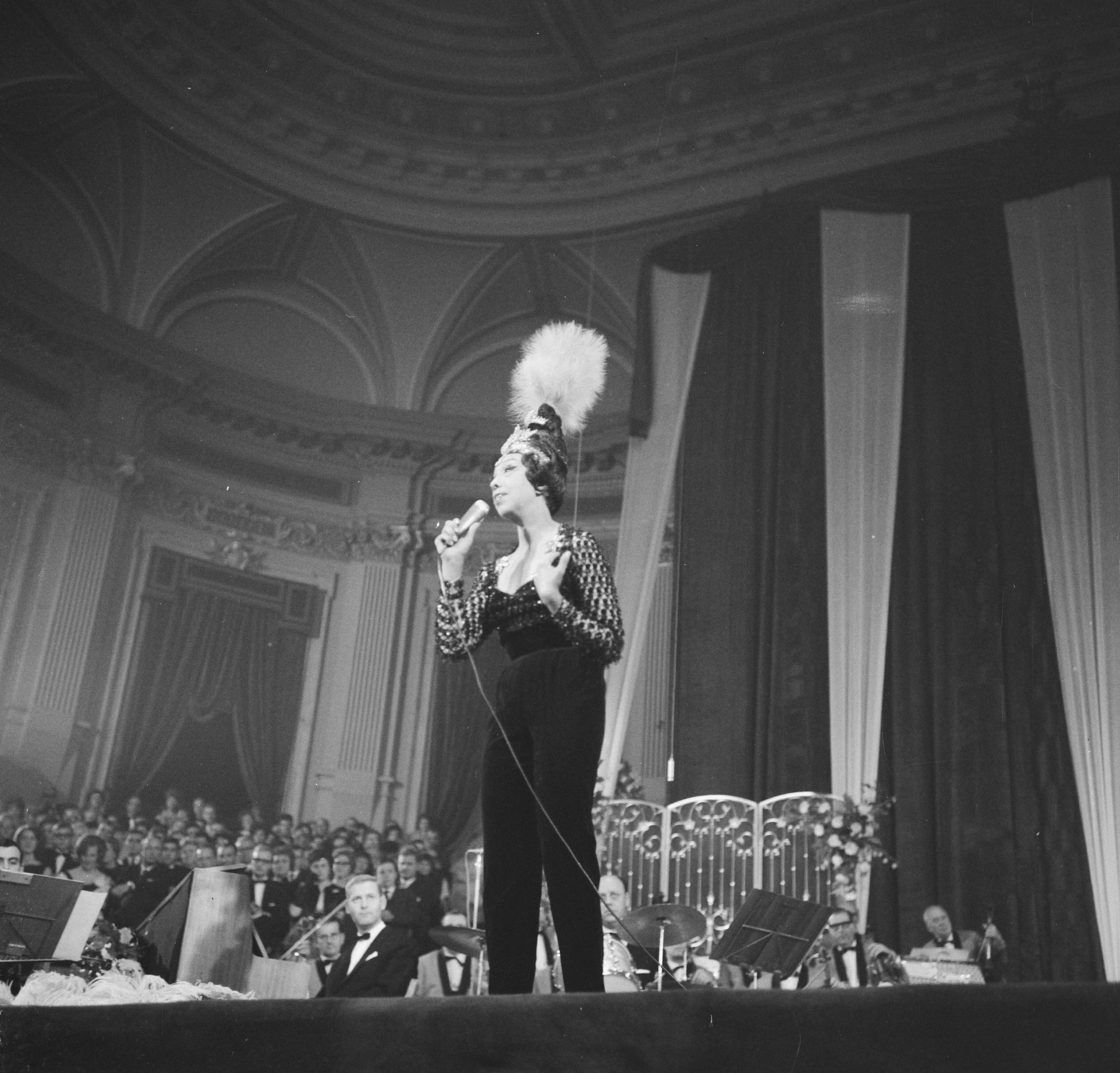 Collectie / Archief : Fotocollectie Anefo Reportage / Serie : [ onbekend ] Beschrijving : Grand Gala du Disque in Concertgebouw. Uitreiking Edisons. Josephine Baker Datum : 4 oktober 1964 Locatie : Amsterdam Trefwoorden : artiesten, prijsuitreikingen, zangers Persoonsnaam : Baker, Josephine Fotograaf : Nijs, Jac. de / Anefo Auteursrechthebbende : Nationaal Archief Materiaalsoort : Negatief (zwart/wit) Nummer archiefinventaris : bekijk toegang 2.24.01.03 Bestanddeelnummer : 916-9679